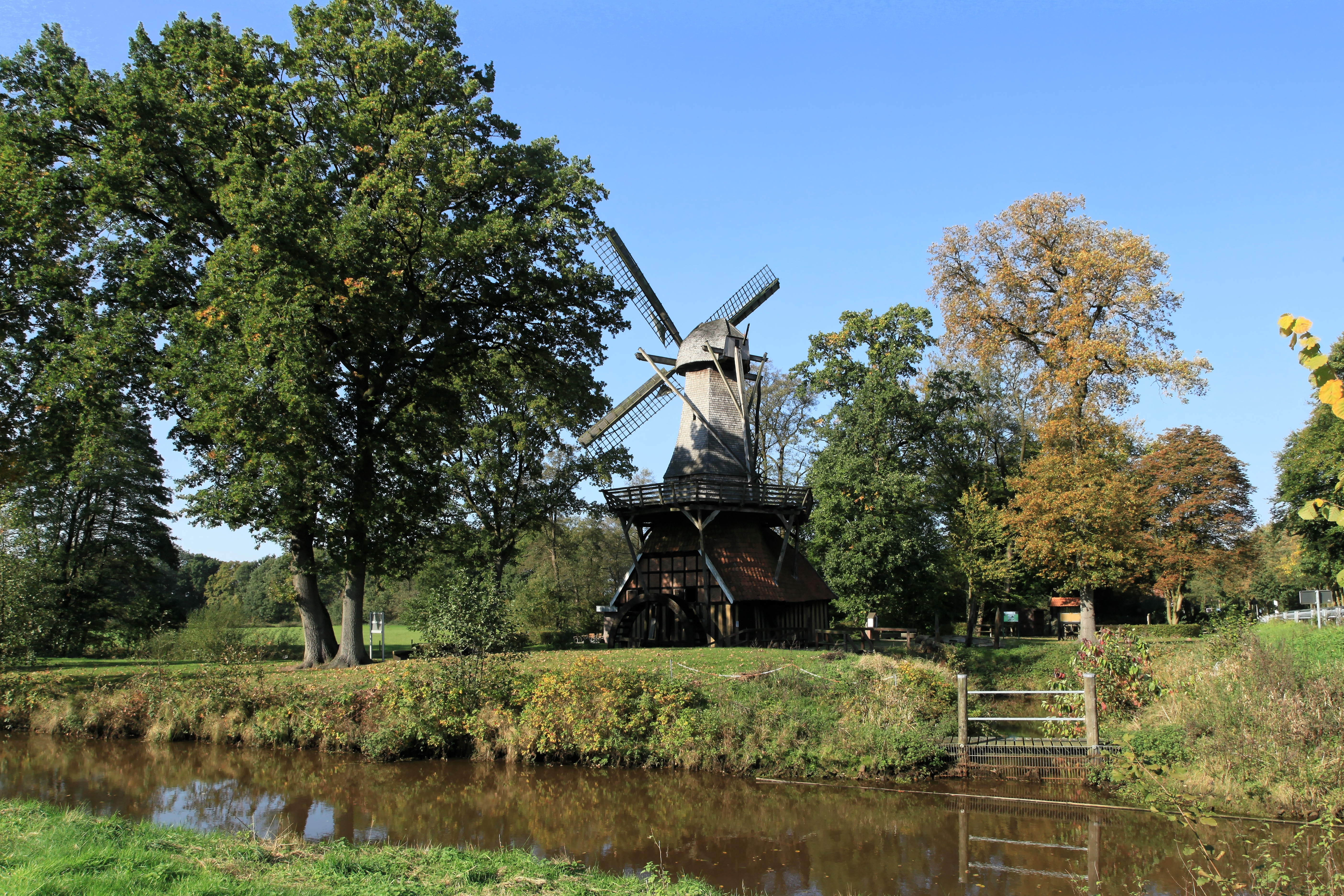 Mittelradde auf der Grenze zwischen Hüven und Lähden vor der Hüvener Mühle im Mühlenpark